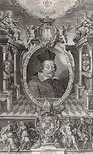 Fürstbischof Franz Wilhelm von Wartenberg